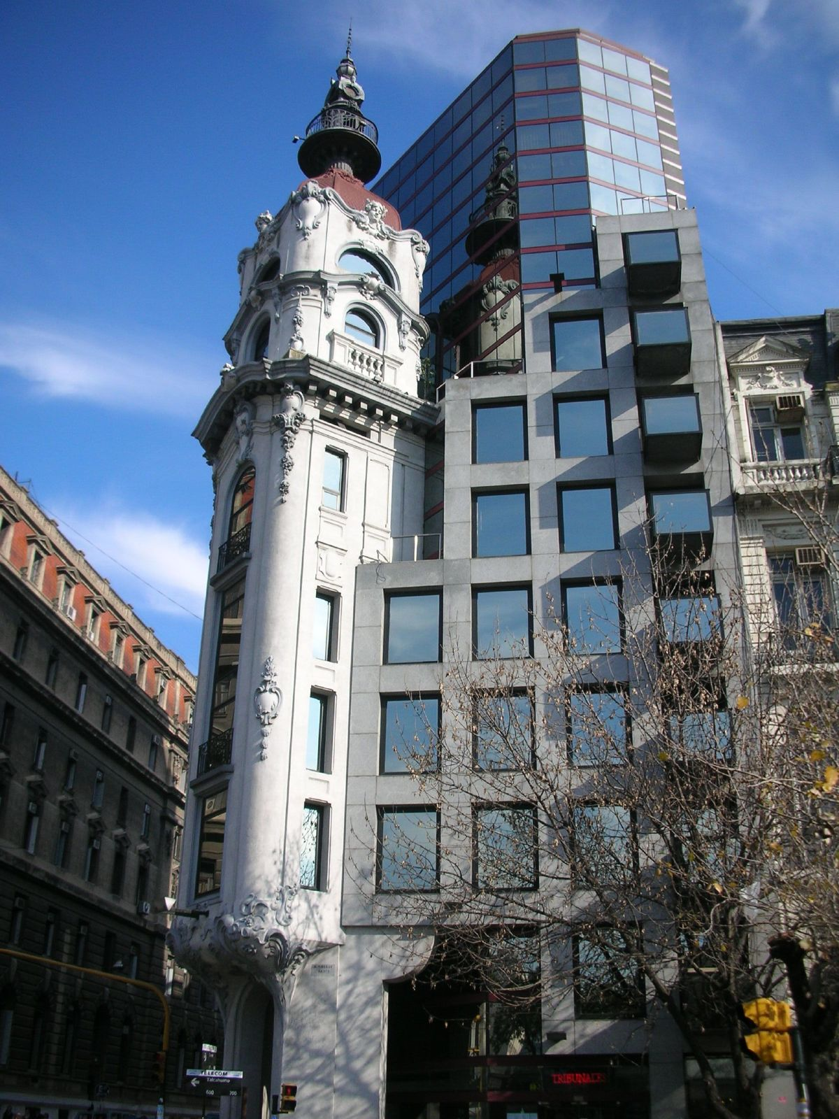 Talcahuano y Tucumán, esquina noroeste, Buenos Aires, Argentina